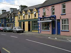 Ballineen